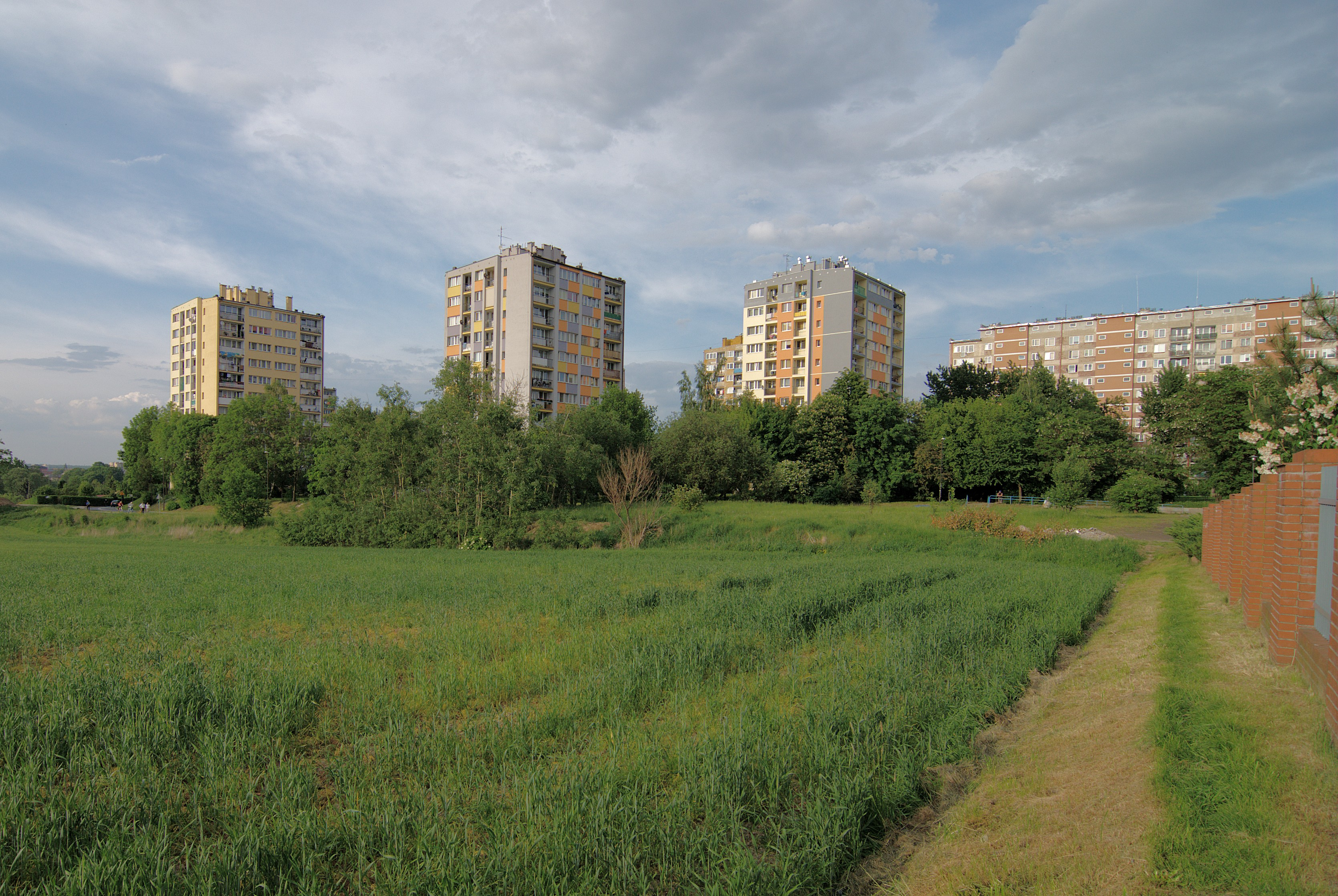 Gliwice. Bloki nr 15, 13, 11 i 1-7 stojące przy ulicy Bekasa.